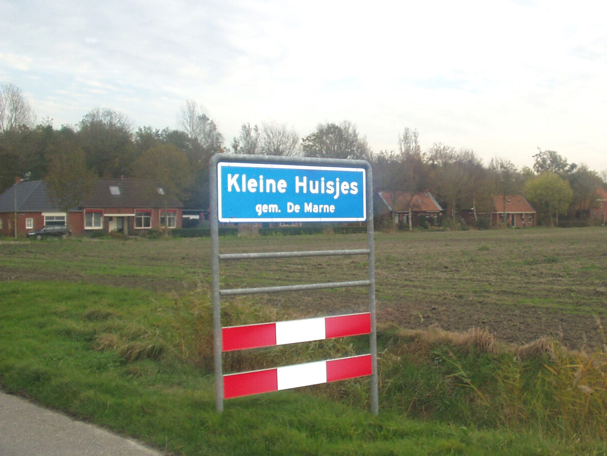 Kûmboerd Kleine Huisjes.